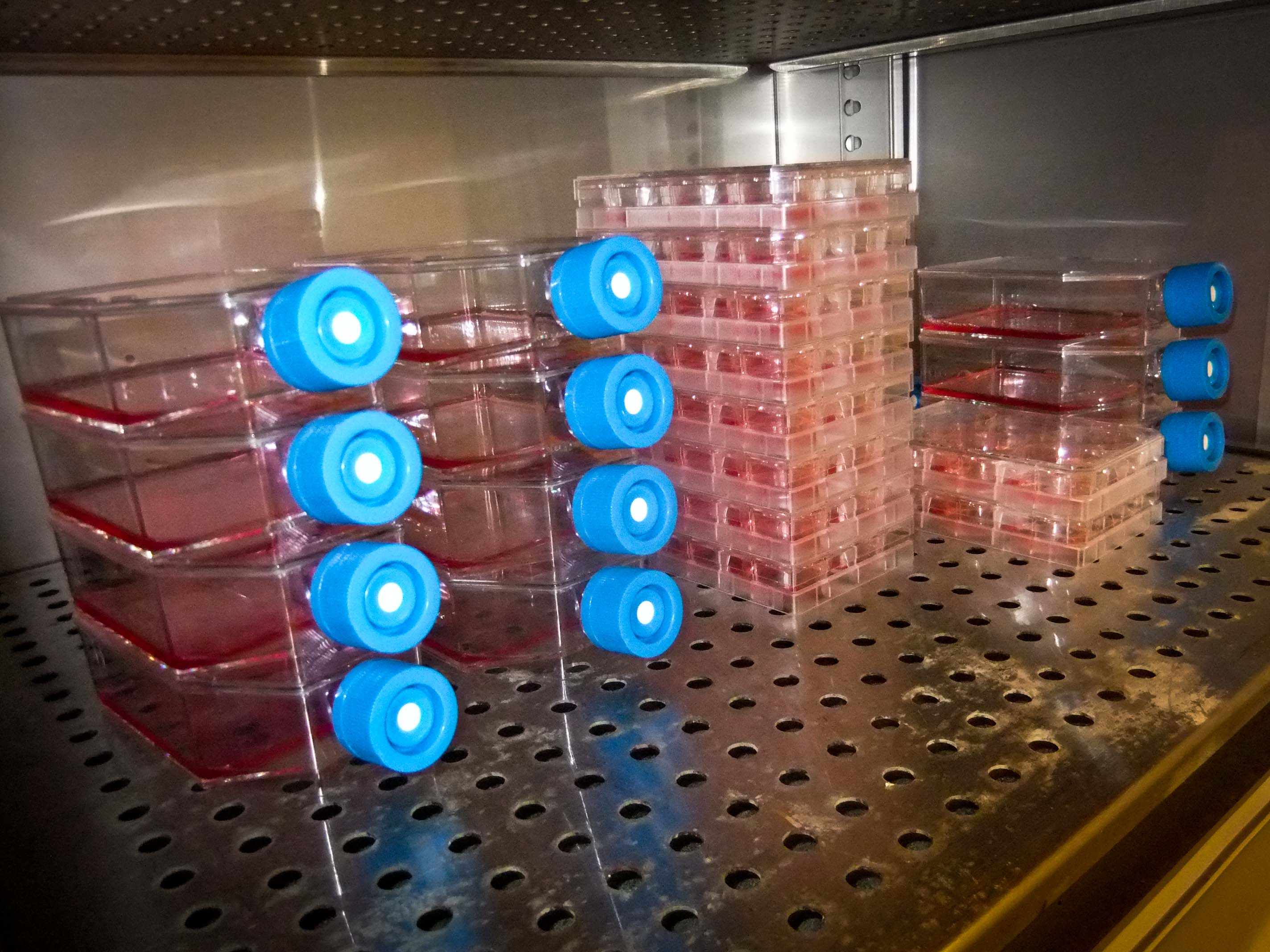 Rinnavähi rakkude laboratoorne kasvatamine plastnõudes